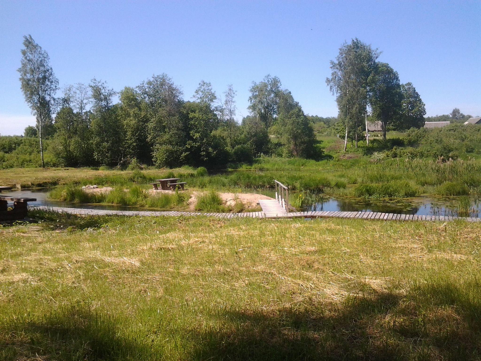 Atpūtas vieta Pestavas krastos pie Ipiķu skolas